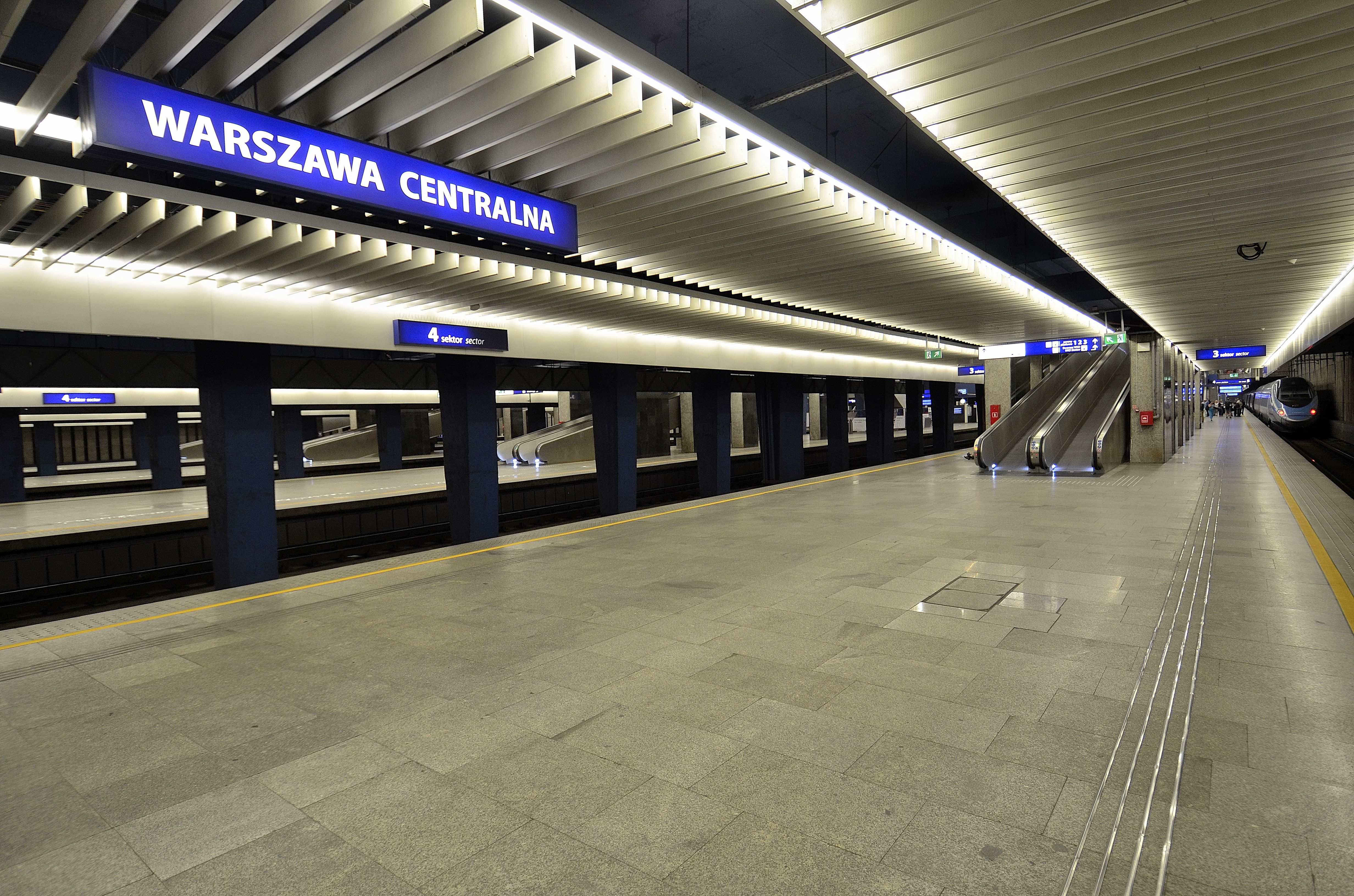 Peron czwarty. Dworzec Centralny w Warszawie